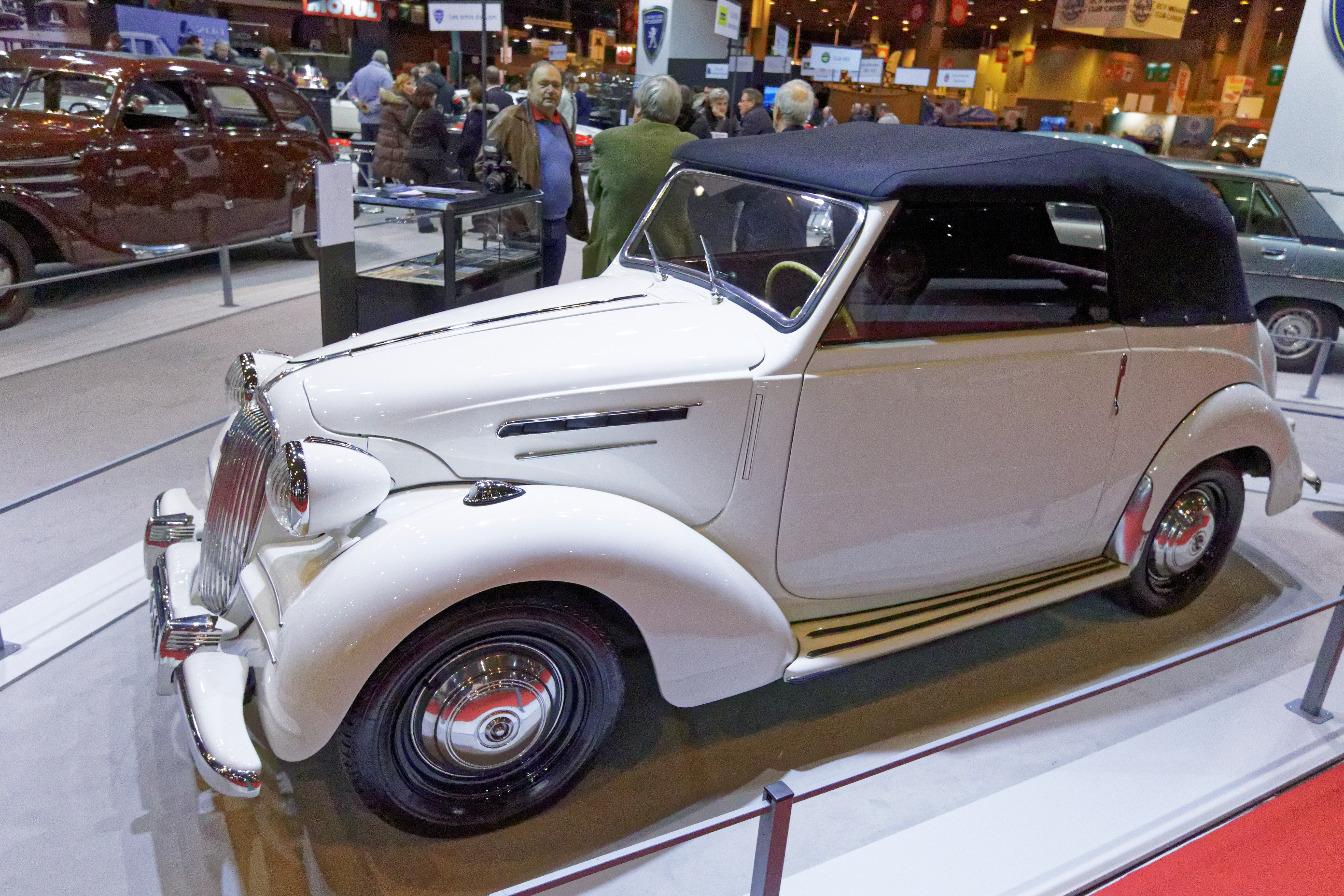 Une des voiture présentée lors du salon Rétromobile de Paris 2015